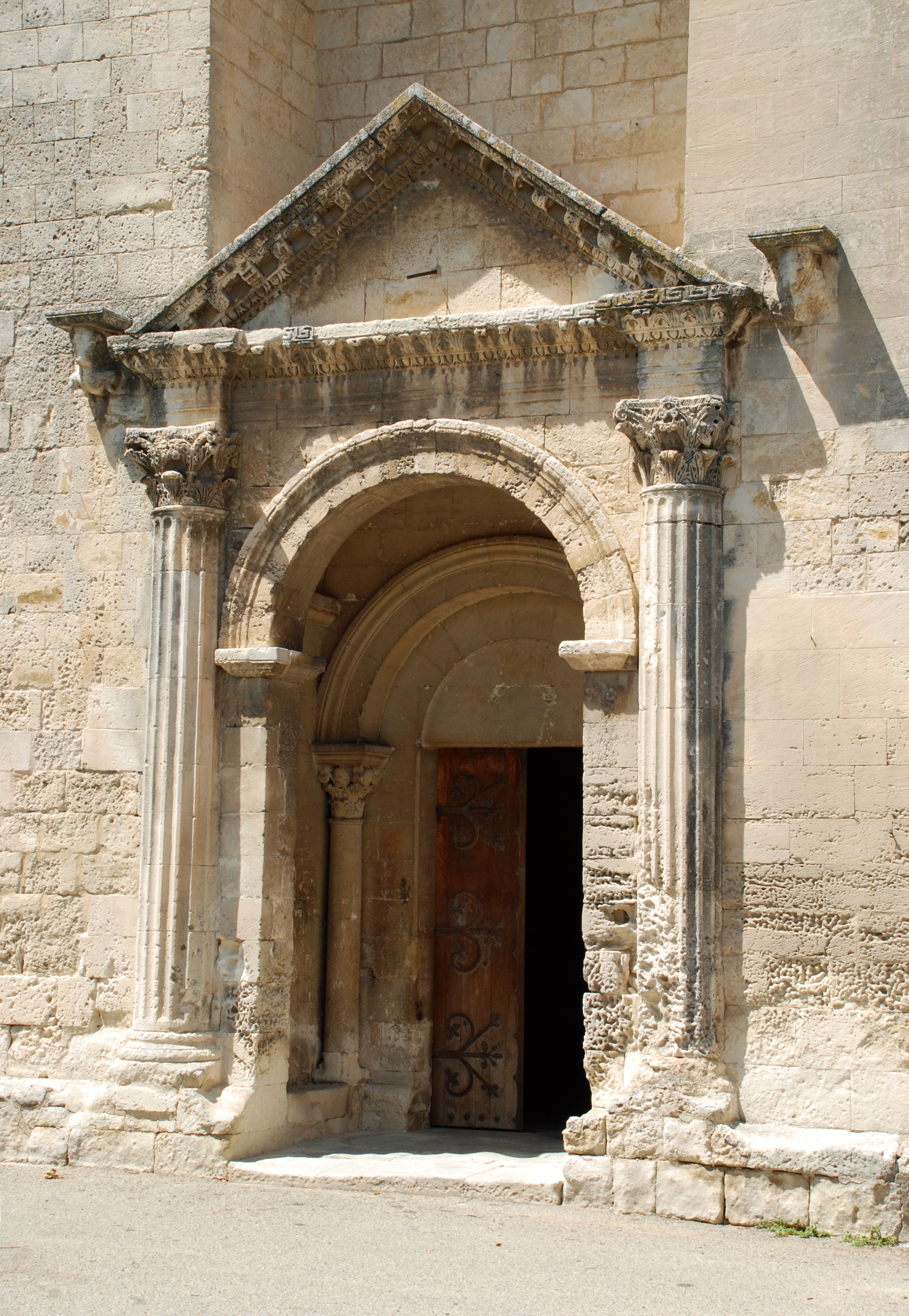 France - Drôme - Tricastin - Saint-Restitut - église : portail à l'antique